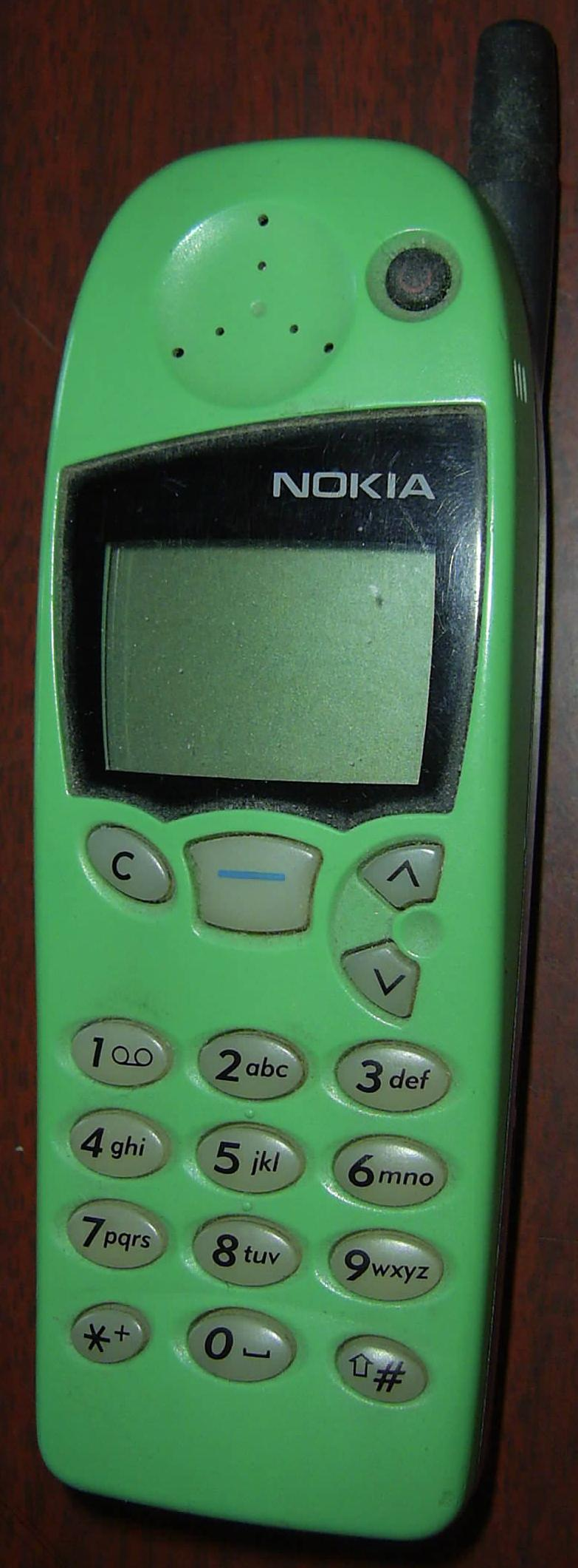 Teléfono móvil Nokia 5110